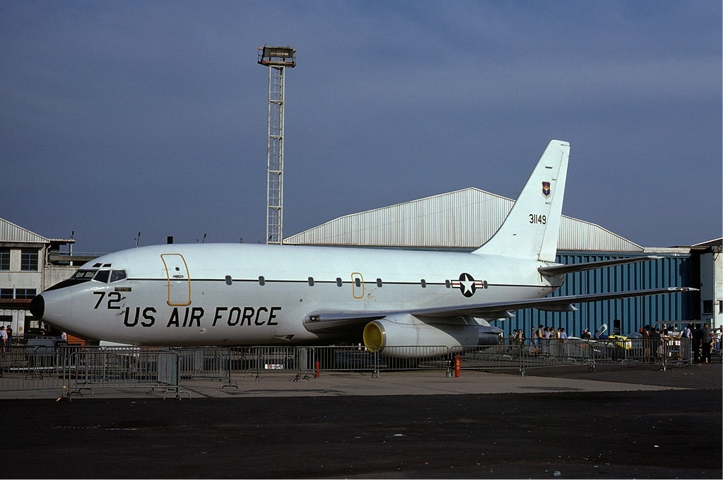 USAF Boeing T-43A